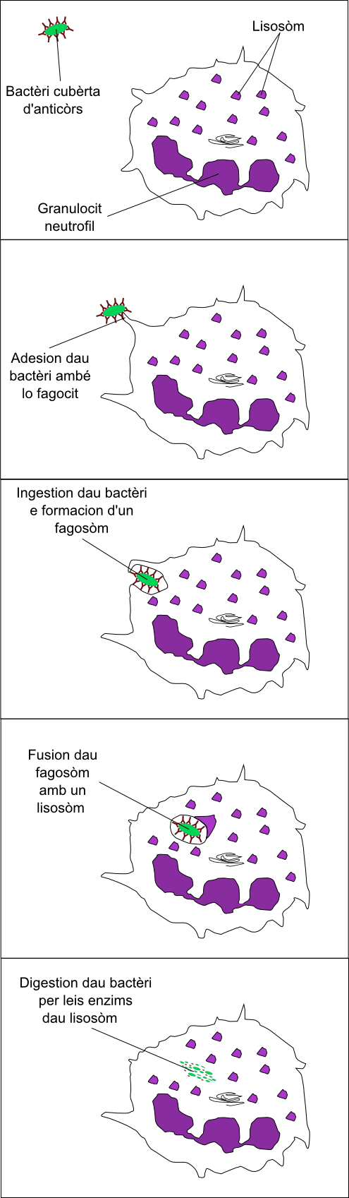 Esquèma de la fagocitosi.